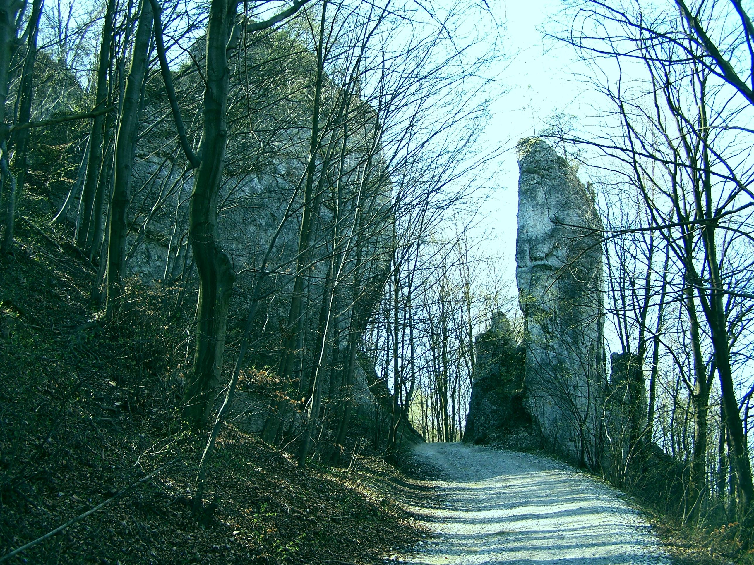 Dolina Będkowska (Park Krajobrazowy Dolinki Krakowskie)